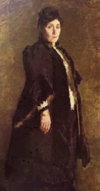 Portrait de Maria Antonietta Torriani Torelli par Leonardo Bazzaro, huile sur toile, conservé à la Gallerie d’art moderne de Turin.